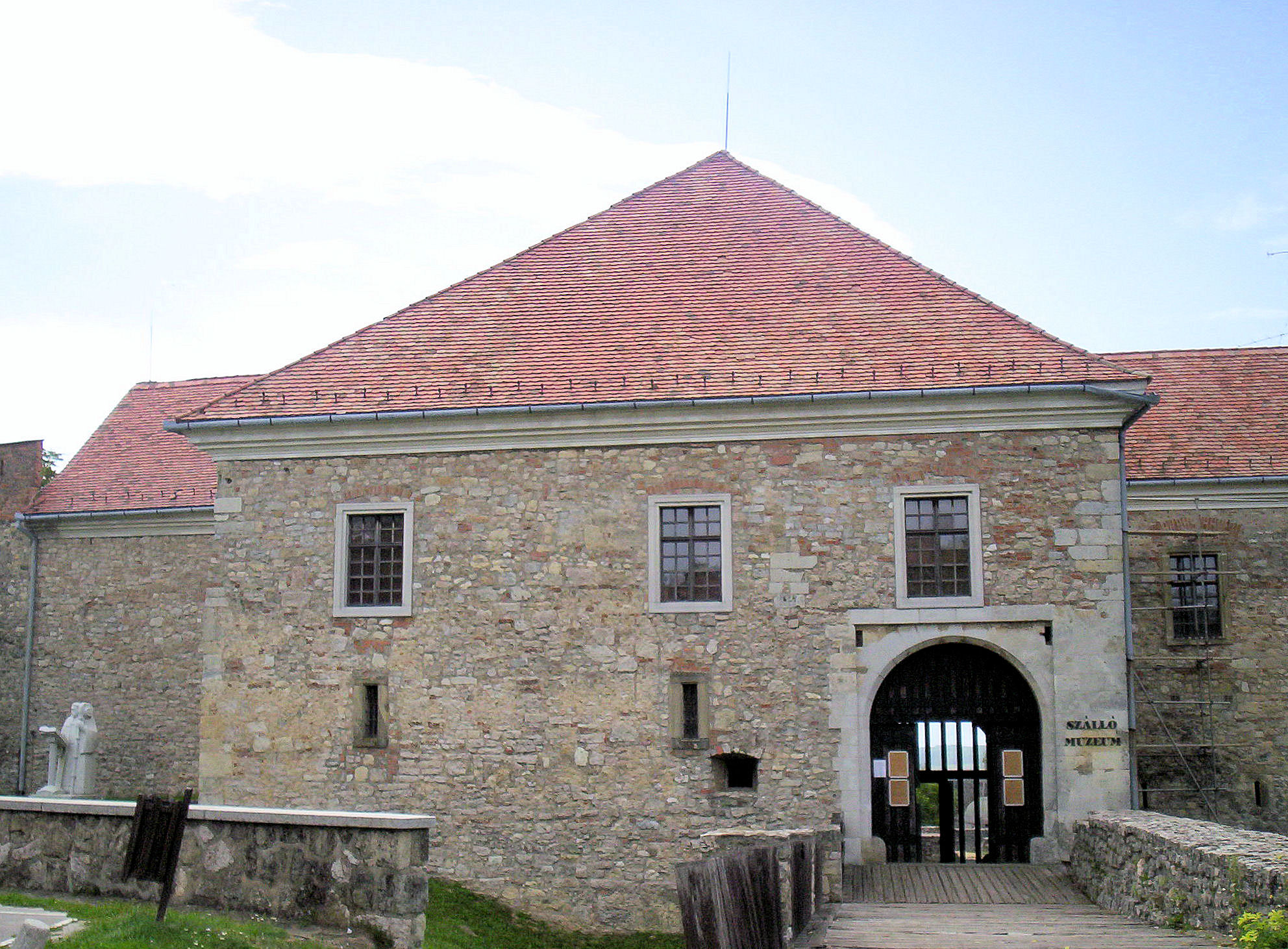 A pécsváradi vár – photo taken by uploader User:Csanády in 2006.